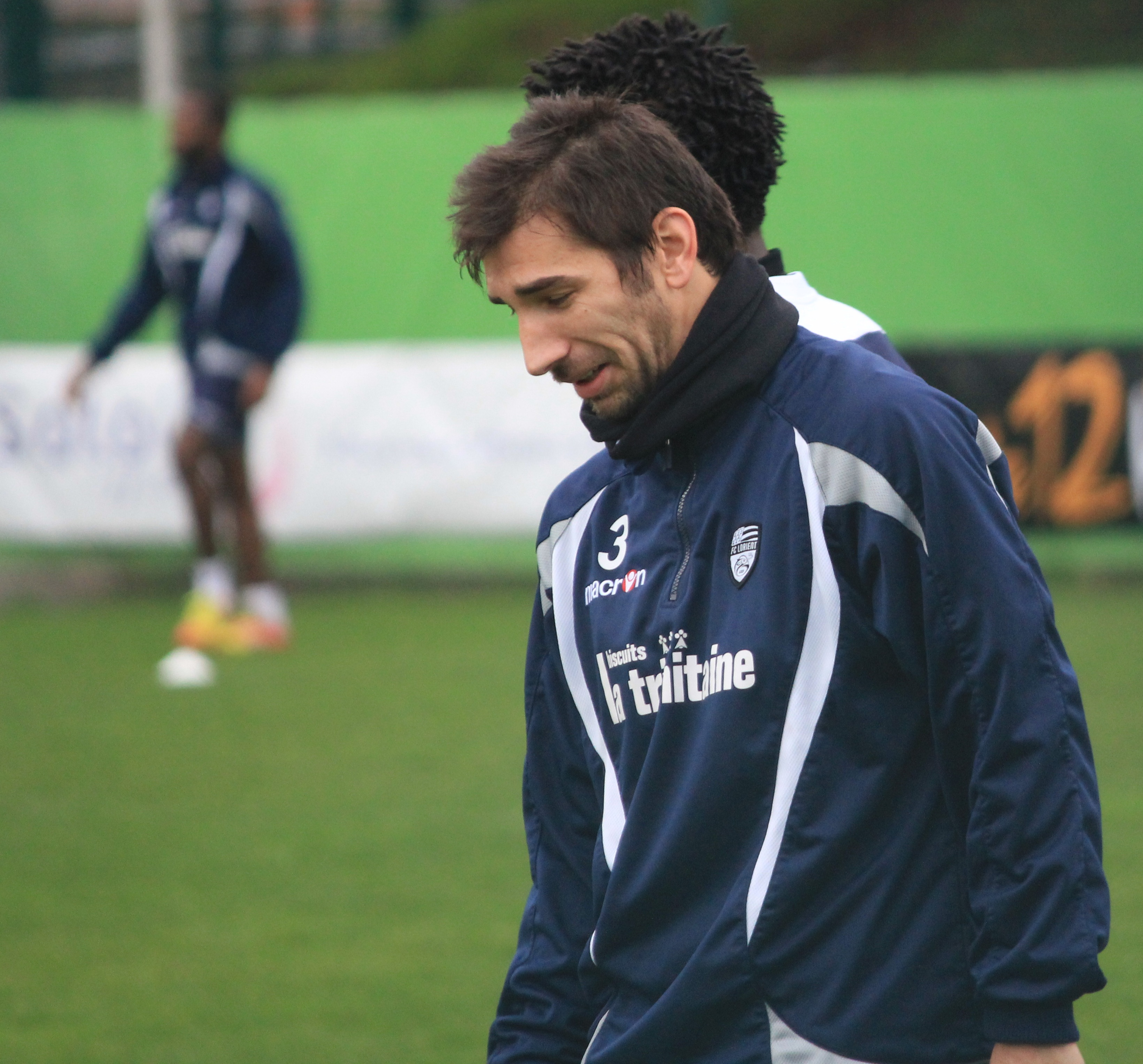 Pedro Miguel Silva Rocha pendant un entrainement du FC Lorient le 3 janvier 2012